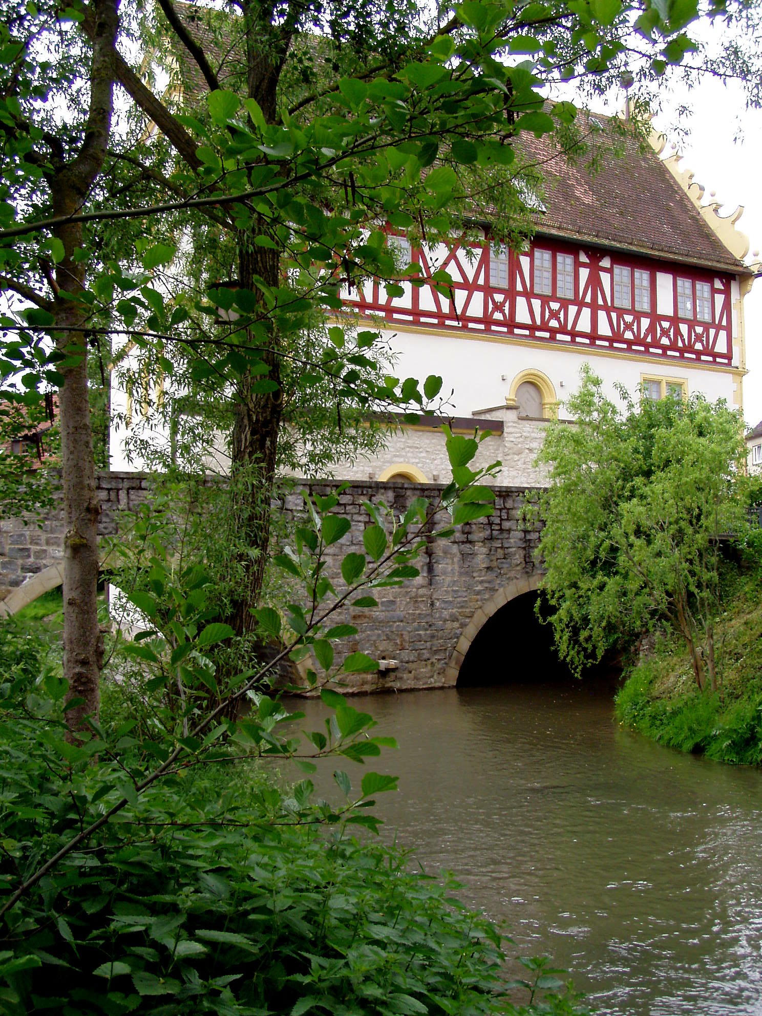 Breitbachbrücke und Rathaus von Obernbreit